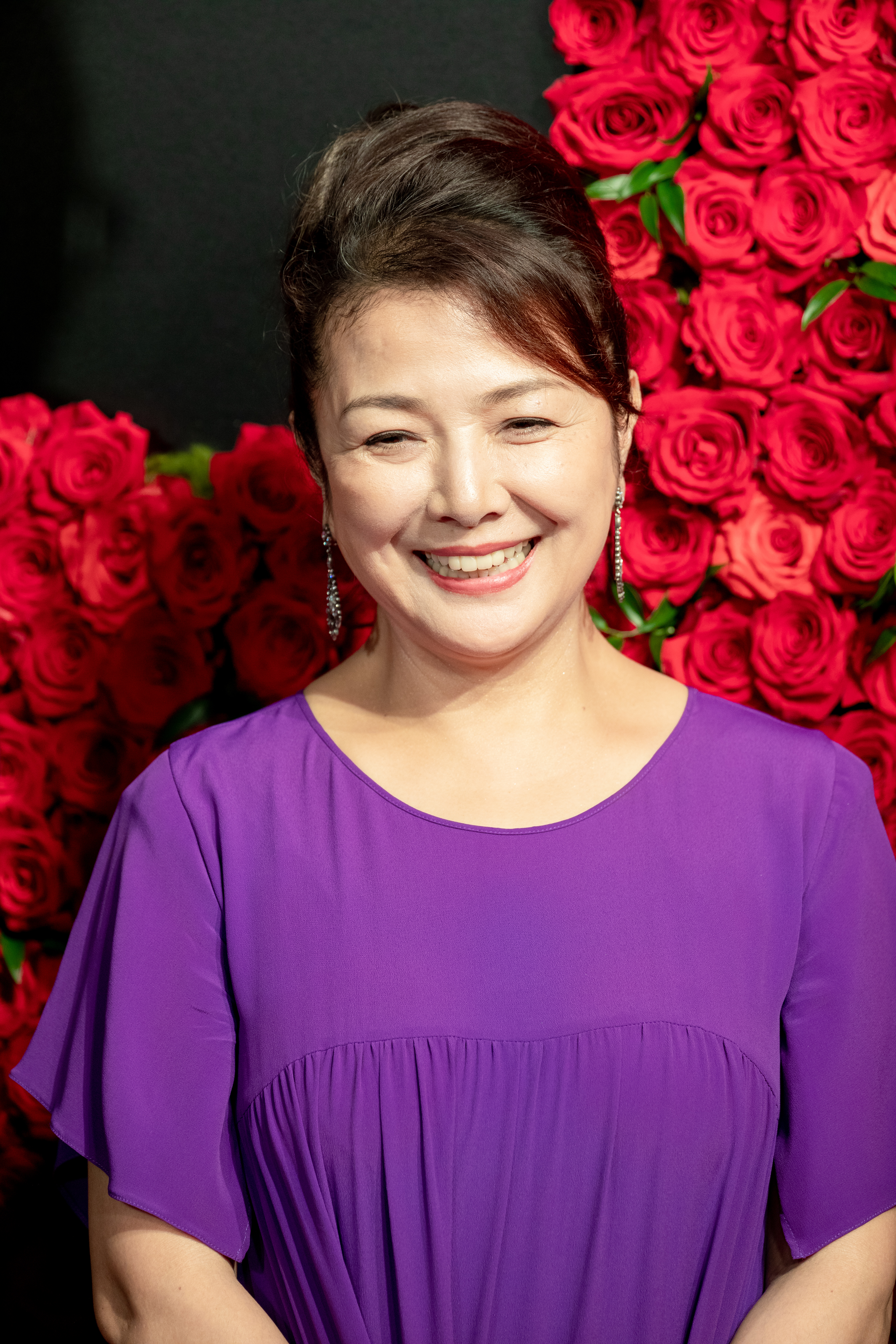 第30回 東京国際映画祭 オープニングセレモニー 原日出子 (鈴木家の嘘)